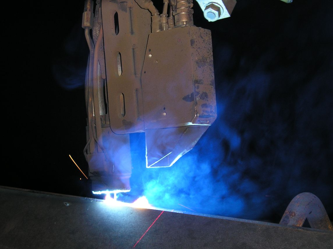 Tandemschweißen mit Falldorf Lichtschnittsensor